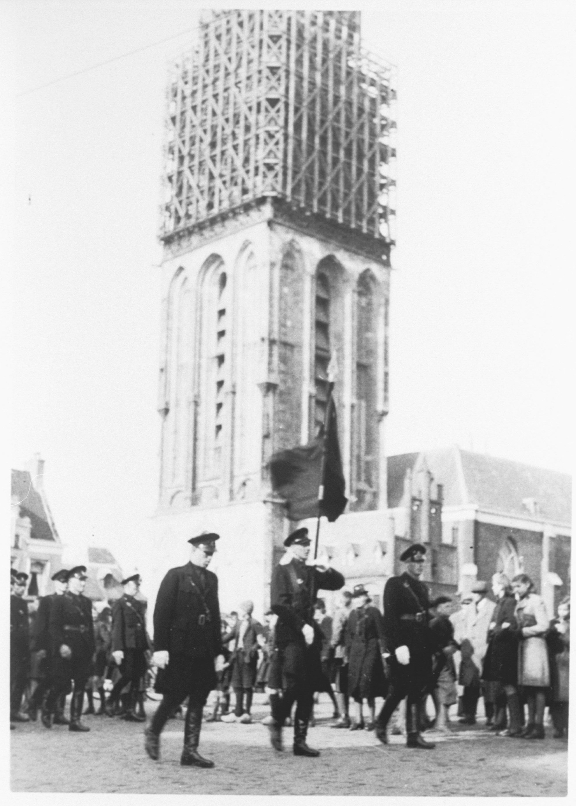 De WA (Weerbaarheidsafdeling) van de NSB. Deze foto is afkomstig uit het archief van de Fotodienst der NSB.